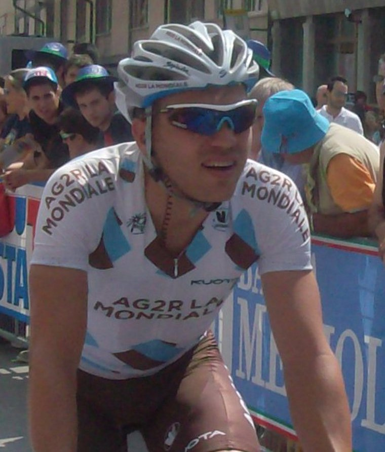 Foto in primo piano di Rinaldo Nocentini